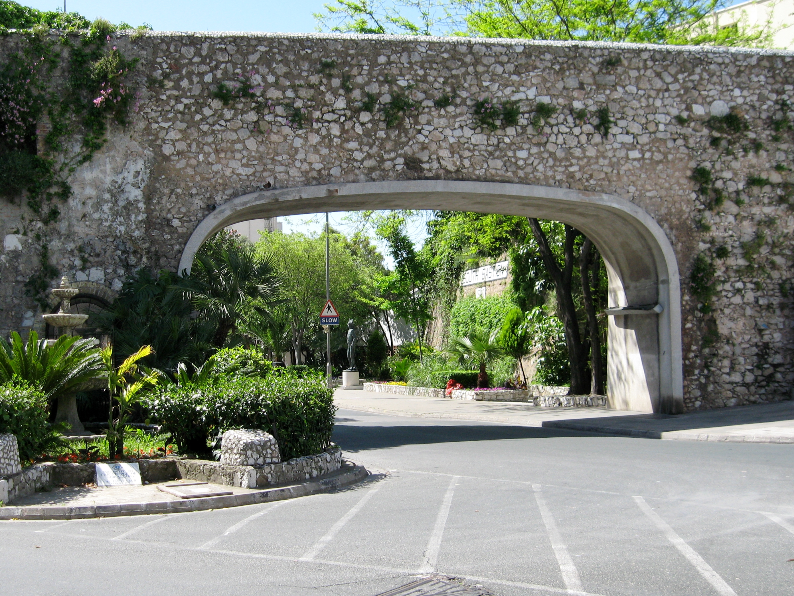 Das Neue Tor (New Gate) der Südhafen-Tore (Southport Gates) in Gibraltar